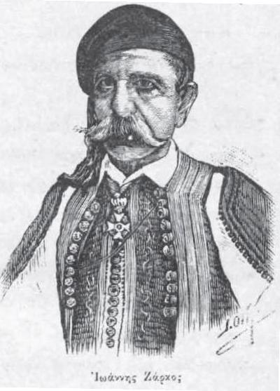 namhafte Griechische Persönlichkeit, 19. Jahrhundert